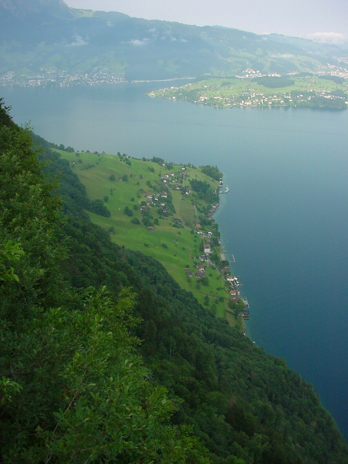 Blick vom Bürgenstock auf den Vierwaldstättersee. Im Hintergrund erkennt man Hergiswil NW, rechts auf der Halbinsel Kastanienbaum und unten am Bürgenstock-Ufer Kehrsiten